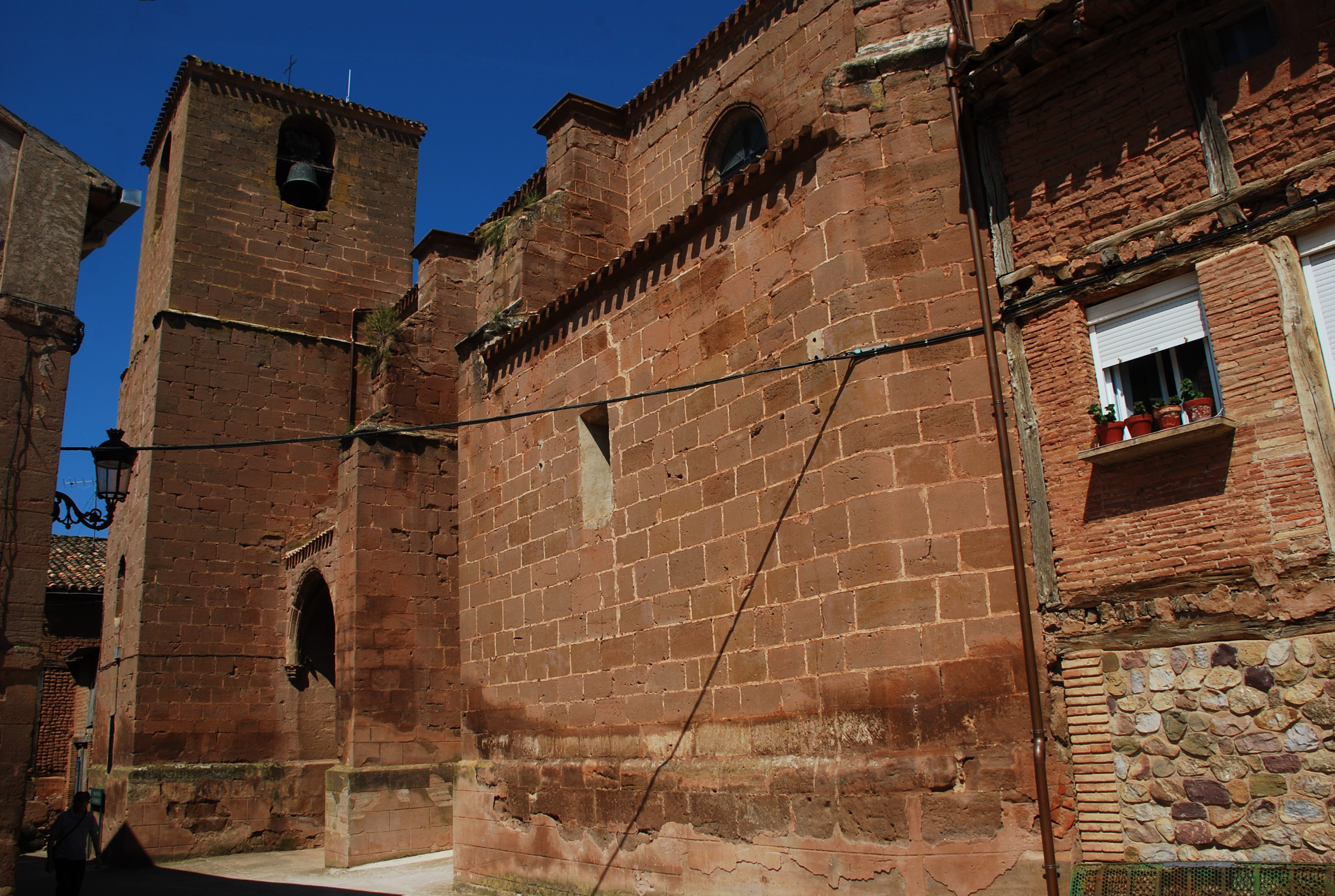 Iglesia de la Asunción en Manjarrés, La Rioja - España.